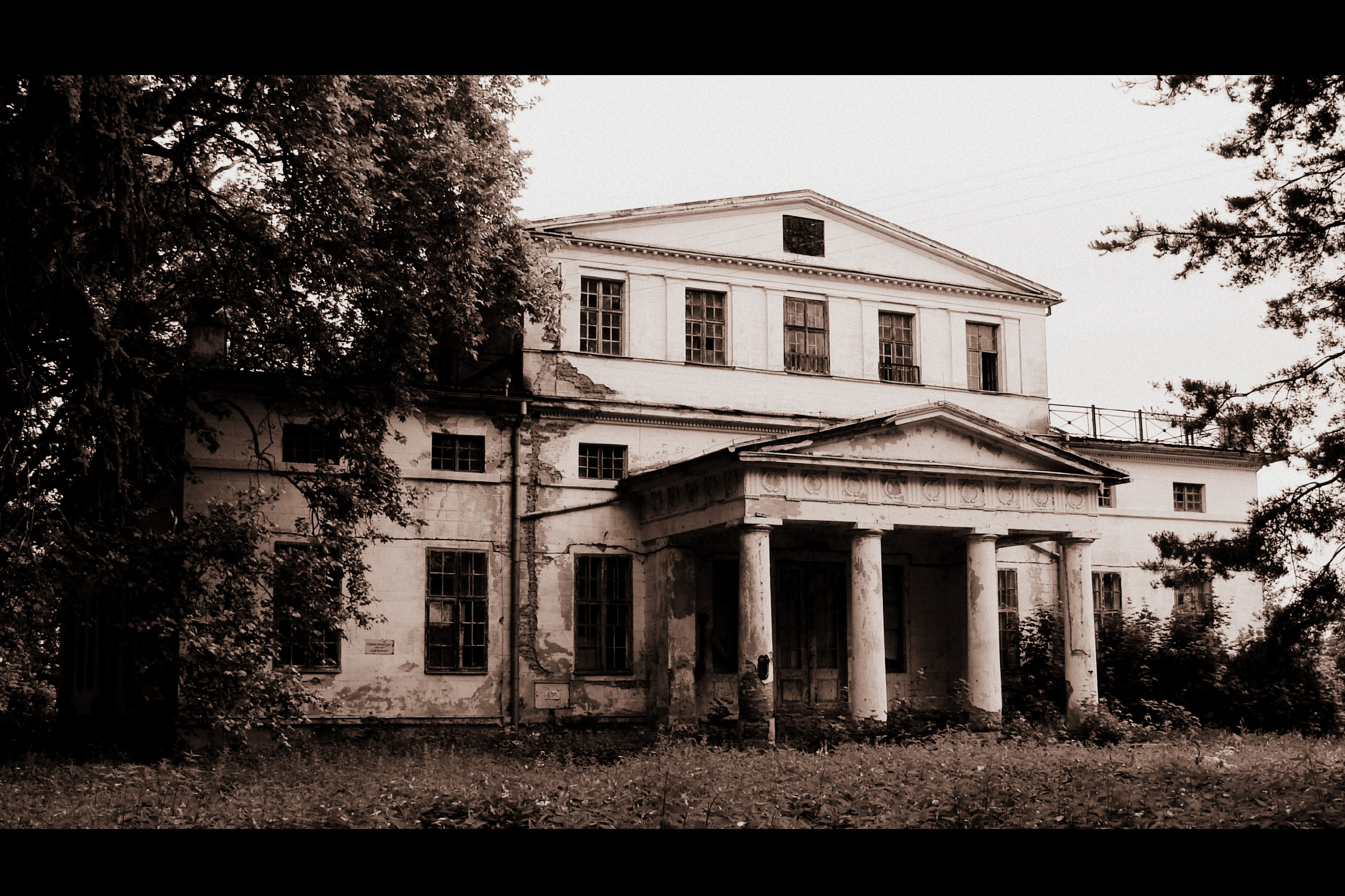 Szymanów, pałac, 1840